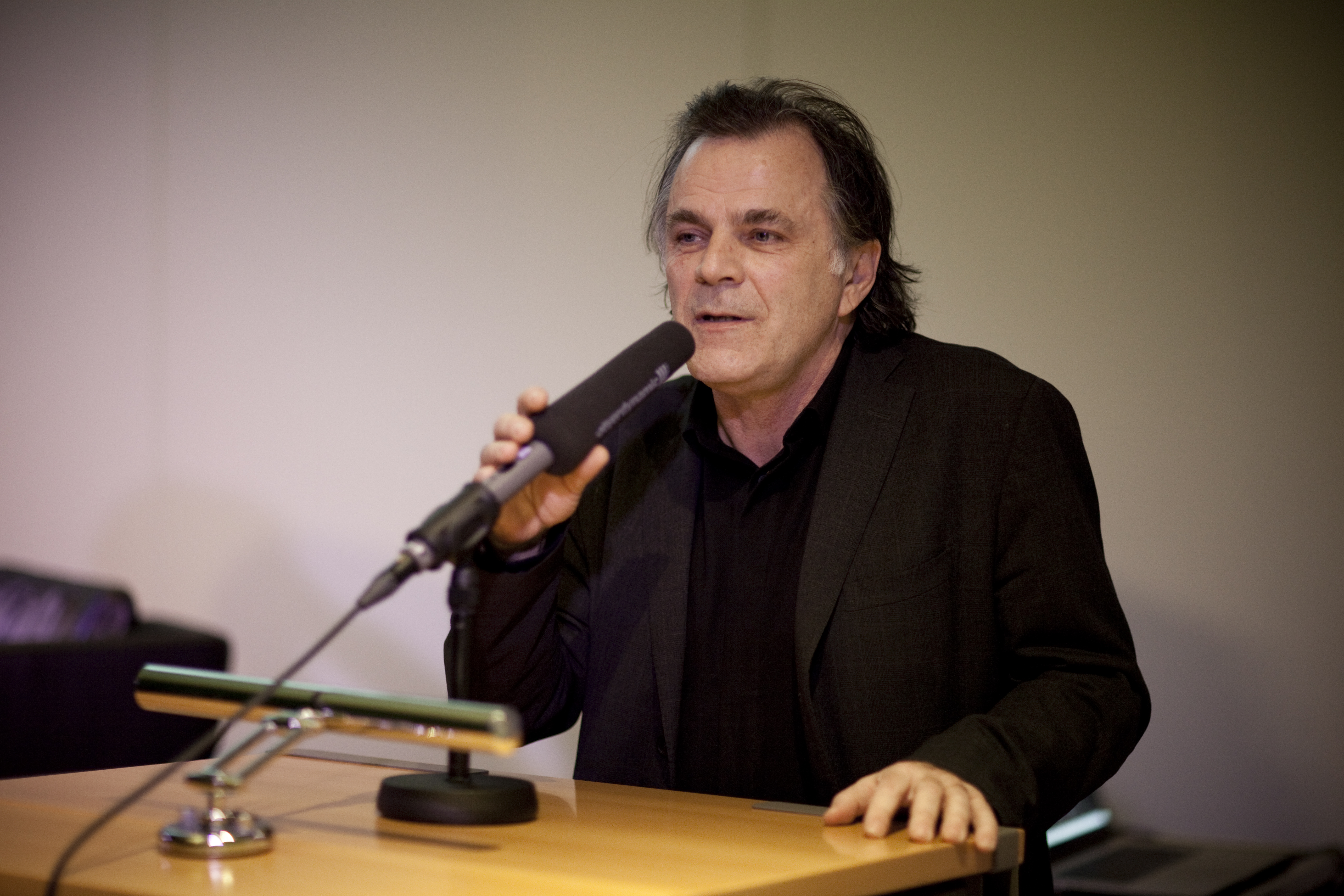 Festkonzert anlässlich des AT-Ratsvorsitzes